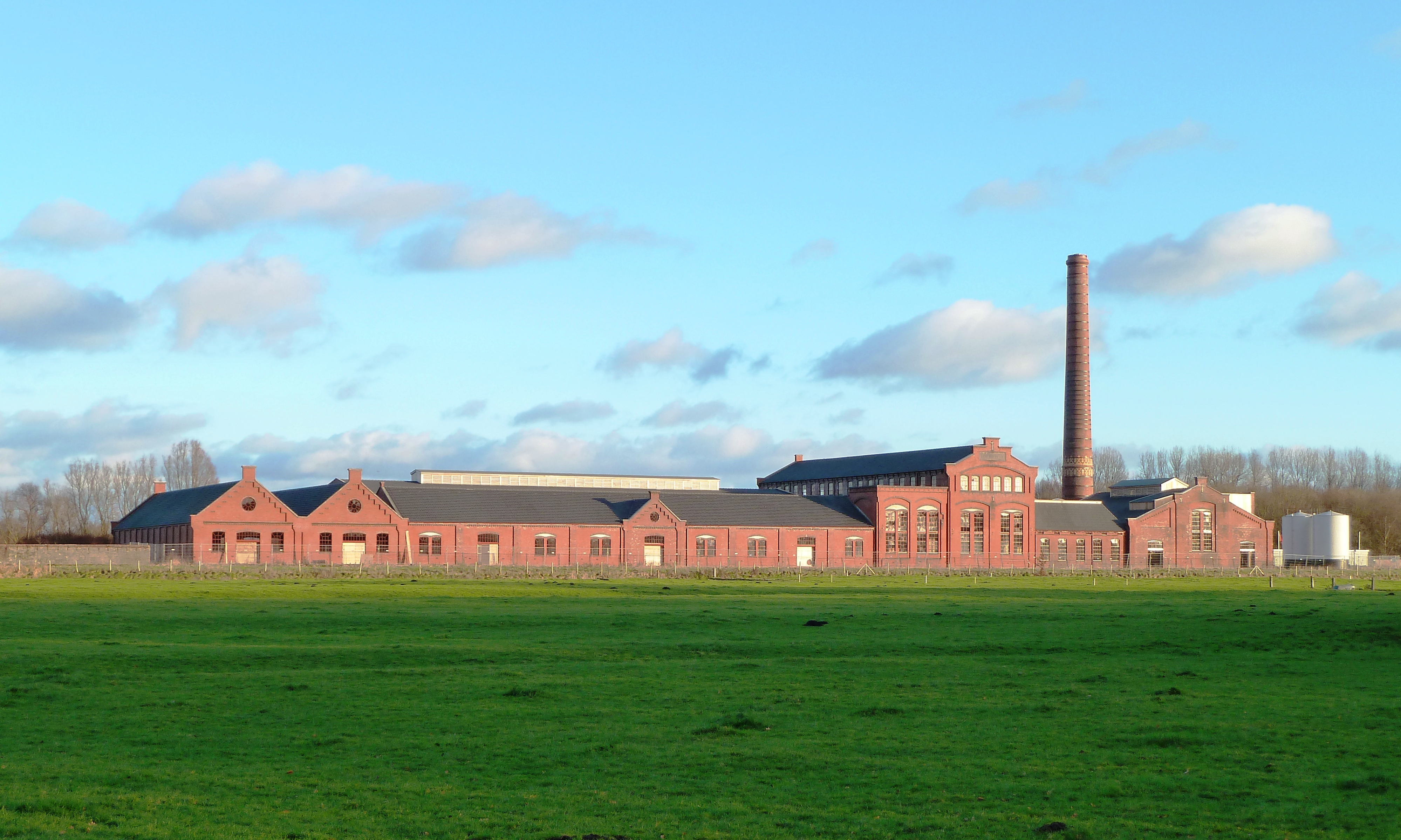 Voormalige strokartonfabriek De Toekomst II bij de Groningse plaats Scheemda.